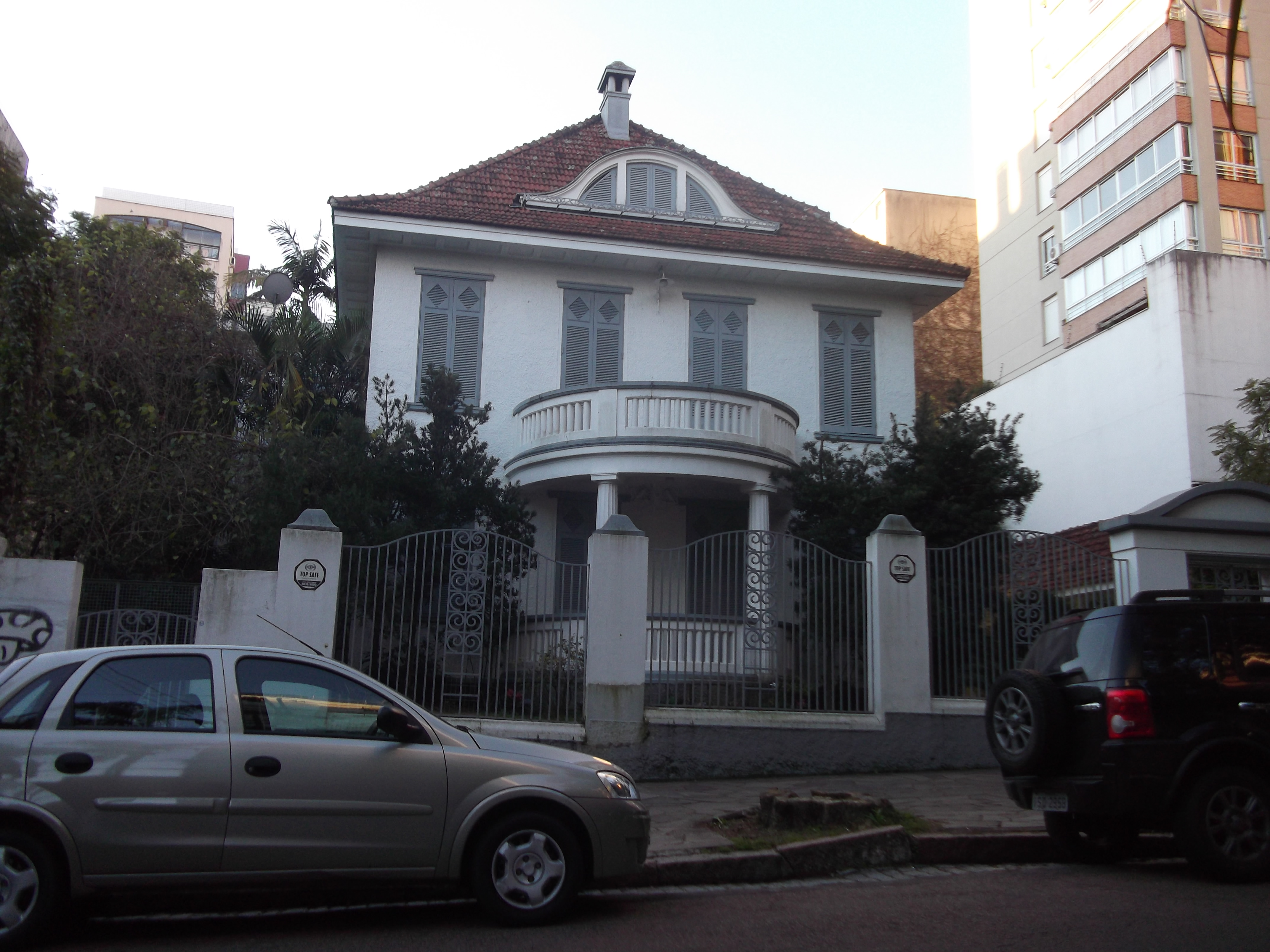 Palacete H. Theo Möller, Bairro Rio Branco, Porto Alegre, Brasil